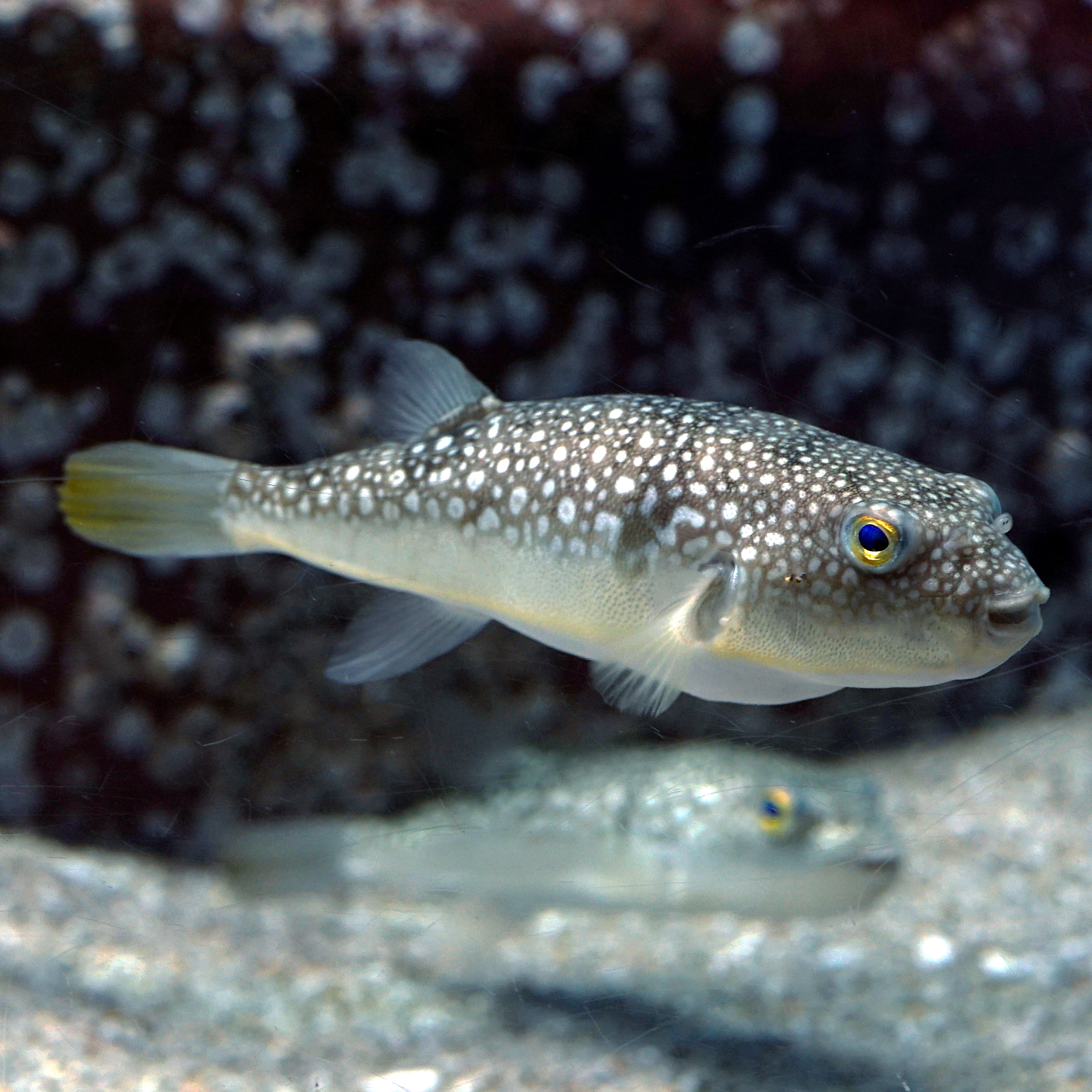 コモンフグ Pufferfish, Finepatterned puffer Domain: Eukaryota • Regnum: Animalia • Phylum: Chordata • Subphylum: Vertebrata • Infraphylum: Gnathostomata • Superclassis: Osteichthyes • Classis: Actinopterygii • Ordo: Tetraodontiformes • Familia: Tetraodontidae • Genus: Takifugu Wikispecies has an entry on: Takifugu poecilonotus. Species Takifugu poecilonotus (Temminck and Schlegel, 1850) 動物界 脊索動物門 条鰭綱 フグ目 フグ科 トラフグ属 Location: Takeshima Aquarium, Aichi pref. Japan Other photos: NCBI Taxonomy ID:176188 ITIS link: Takifugu poecilonotus (Temminck and Schlegel, 1850) (mirror) EOL link: Takifugu poecilonotus uBio search link: Takifugu poecilonotus